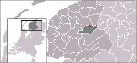 Locatie van De Tike, zelf gemaakt uit sjabloon van Wikipedia-gebruiker Mtcv